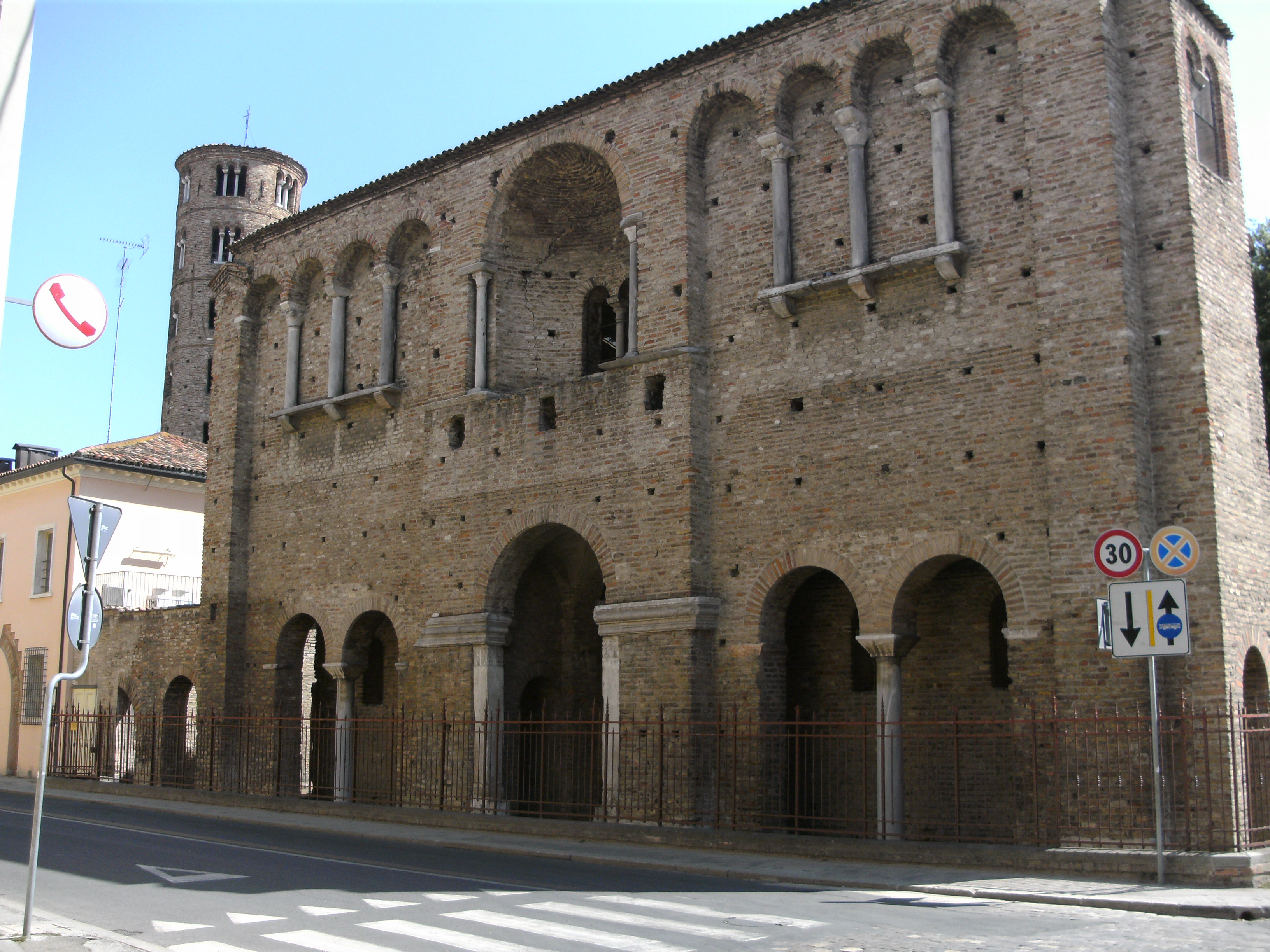 Ravenna, sogenannter Palast des Theoderich